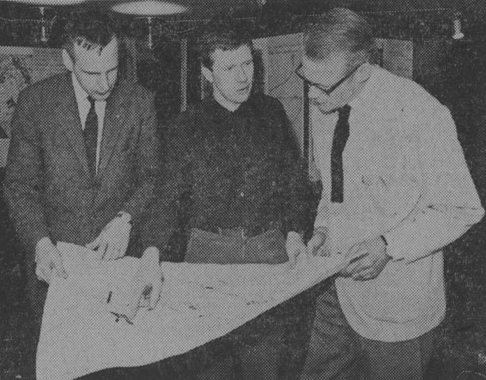 Arkitekterna Hans Matell, Jan Strömdahl och Sverker Erichs betraktar ett objekt på utställningen Bygga för framtiden i Uppsala